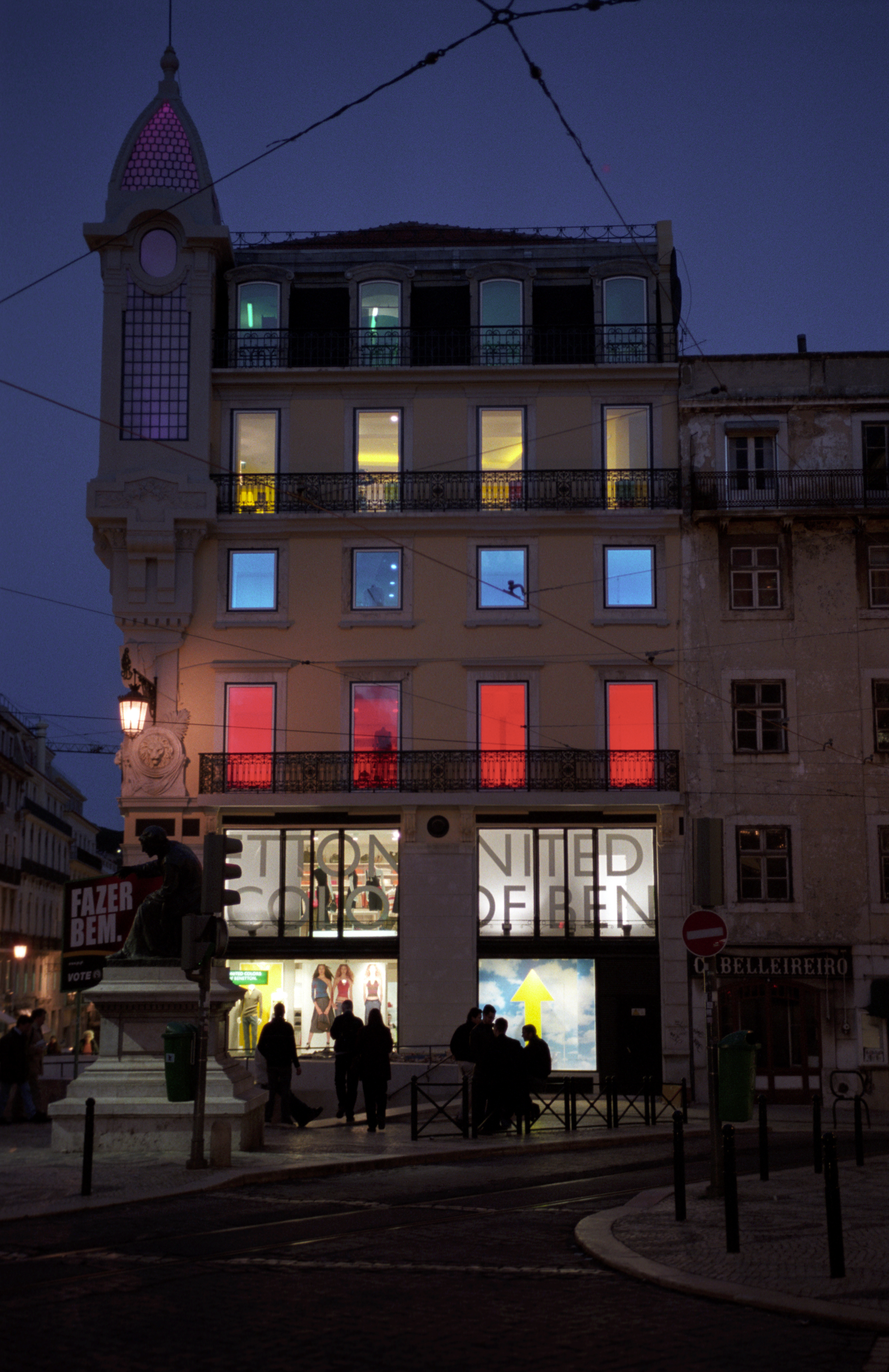 Lisbon, 2002